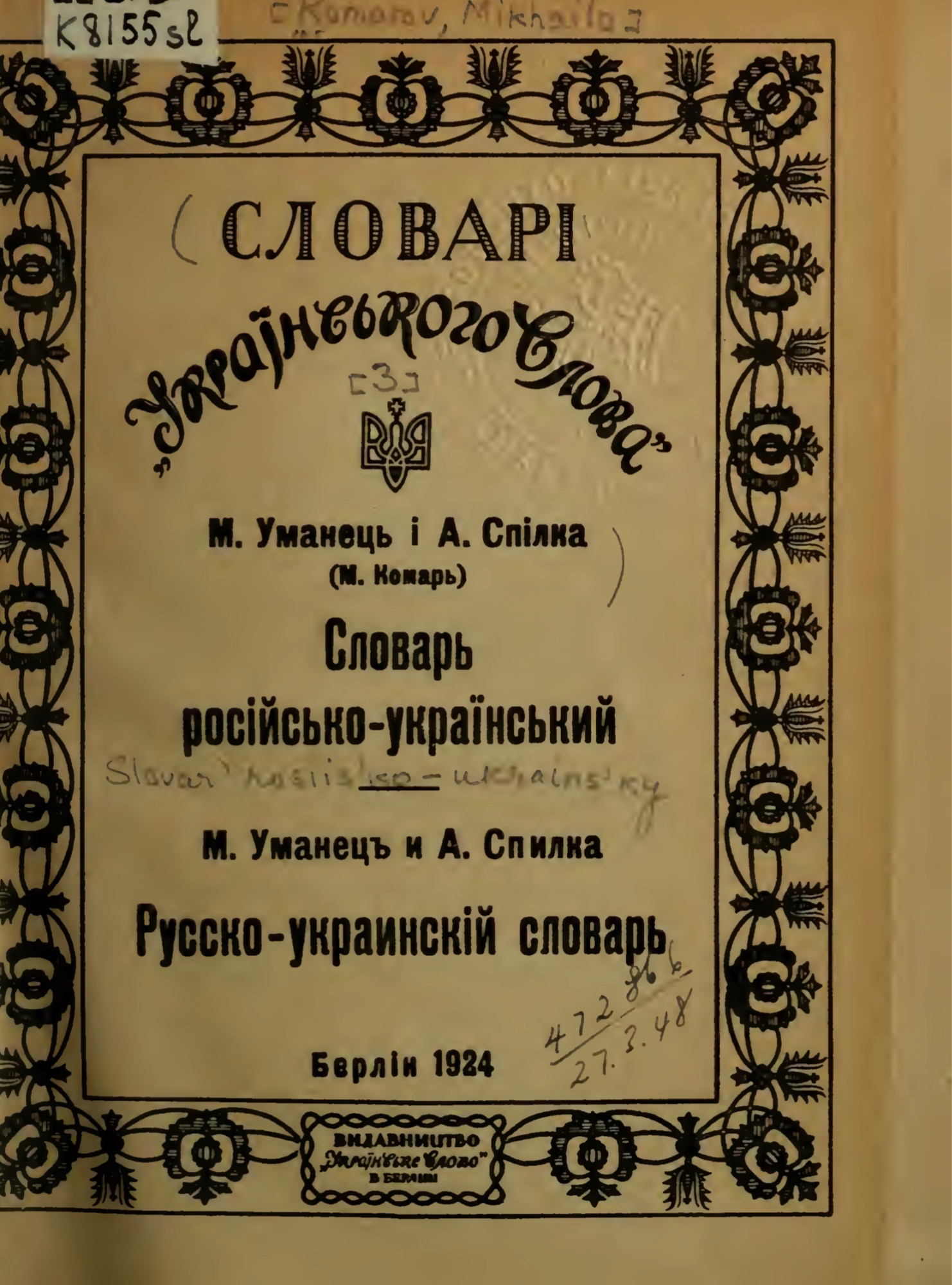 «Словарь росийсько-украаїнський», виданий одним томом у Берліні, 1924 рік